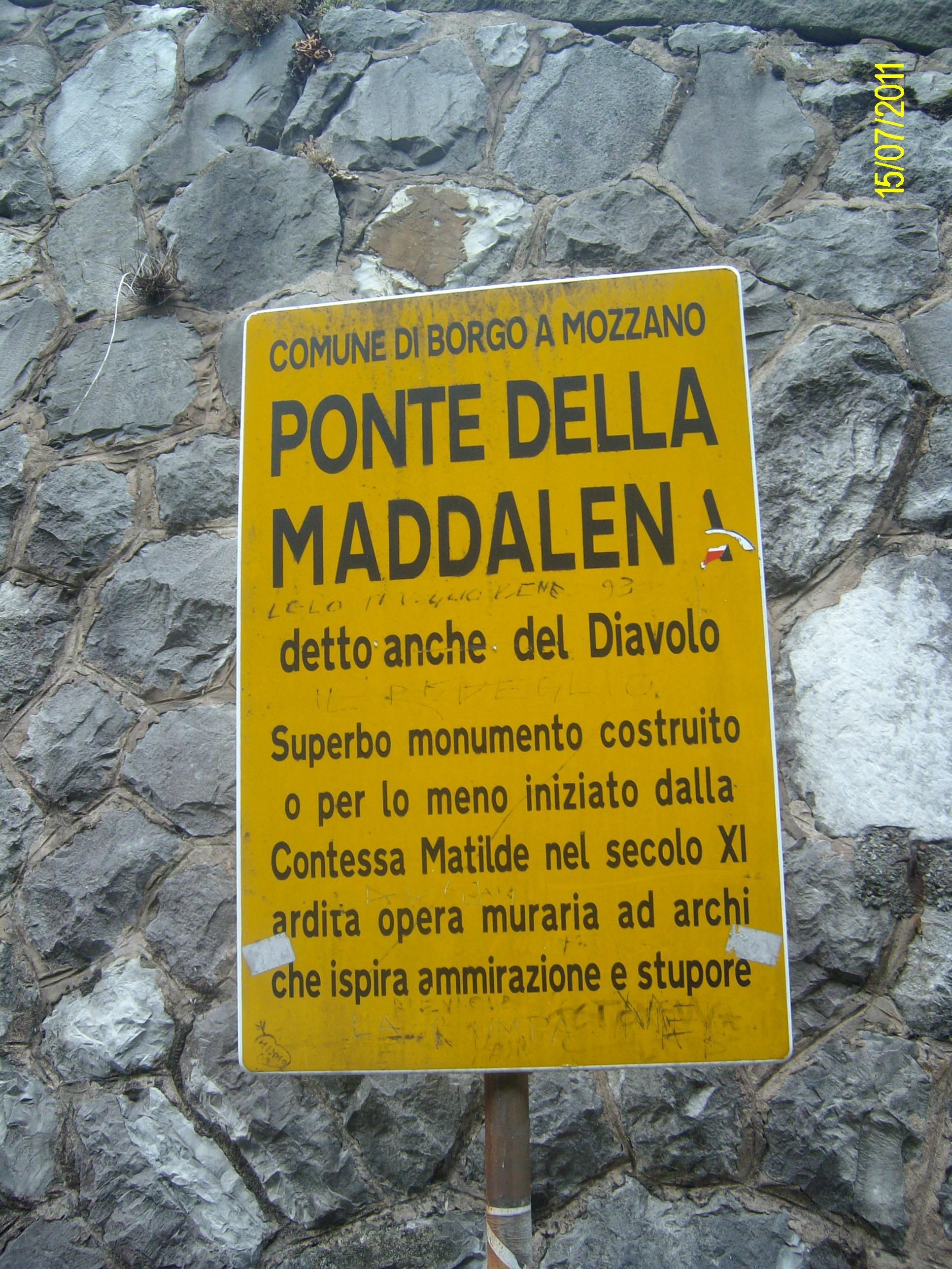 Targa su un lato del ponte